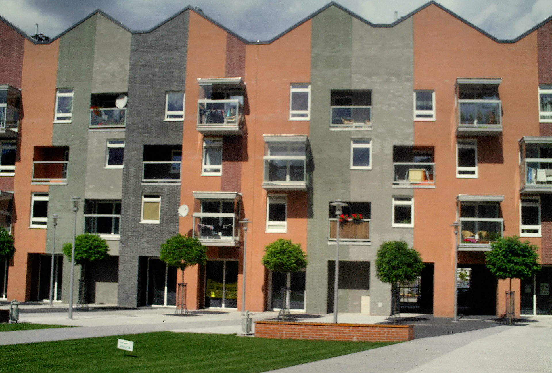 Osiedle Małe Naramowice, Poznań, Polska